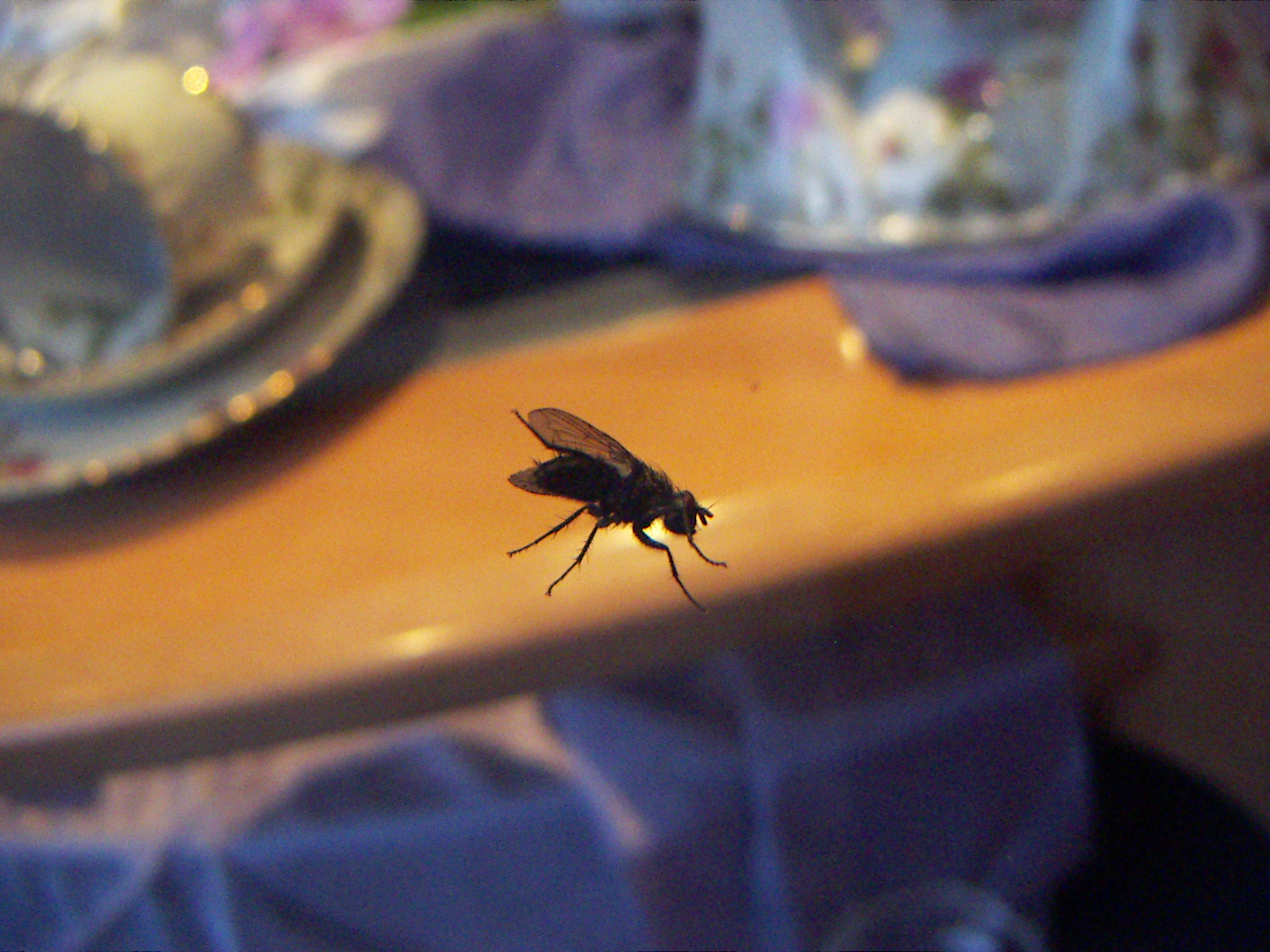 Stubenfliege in ihrer typischen Umgebung, der Stube.